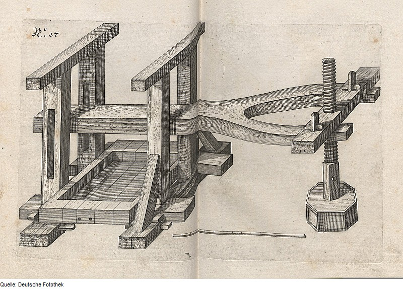 Original image description from the Deutsche Fotothek Architektur & Wein & Presse